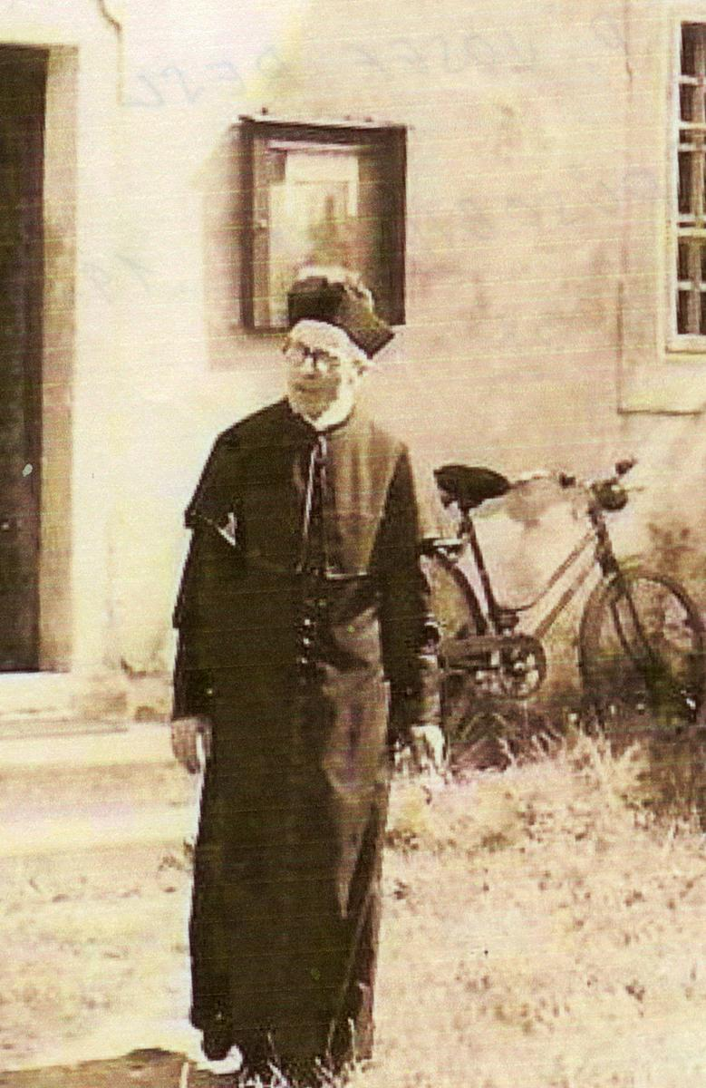 Josef Resl (1885 - 1967), Český římskokatolický kněz.